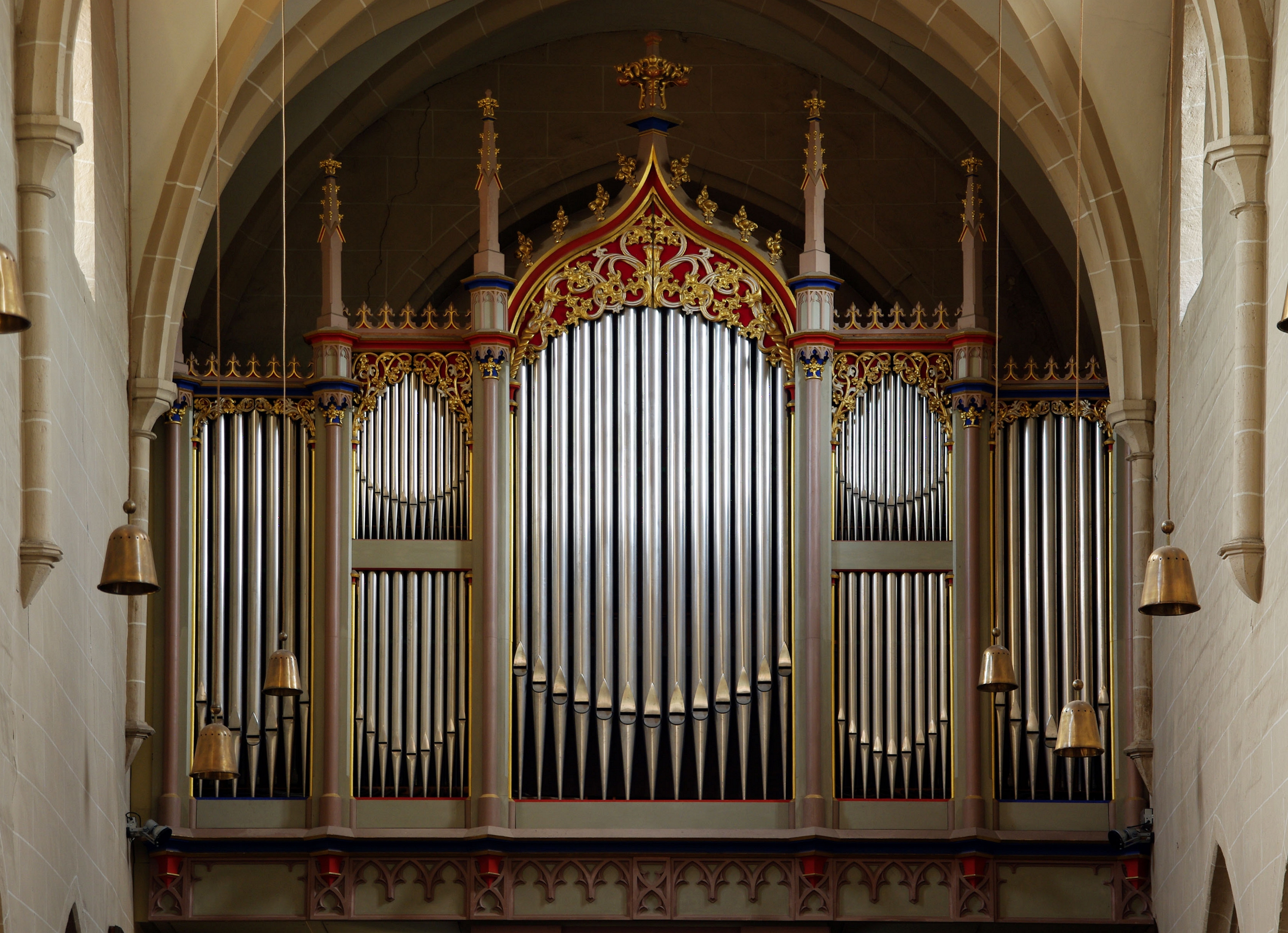 Die Orgel der Bartholomäuskirche Markgröningen auf der dortigen Empore im Westen. Bis 1956 musste sie mehrmals den Platz wechseln (u.a. stand sie im Chor im Osten und verdeckte so die dortigen Glasfenster). 1978 wurde sie unter Beibehaltung des Originalprospekts der 8.000 Gulden teuren Walckerorgel von 1850 von der Firma Vier neu erbaut.